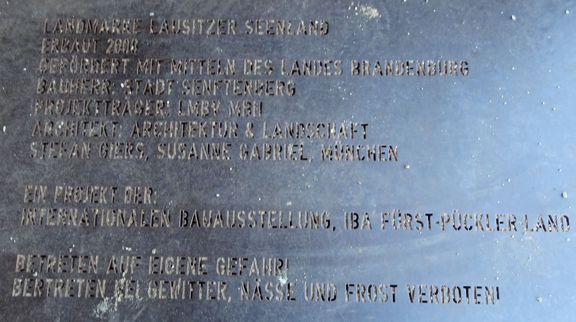 Informationen zum Rostigen Nagel